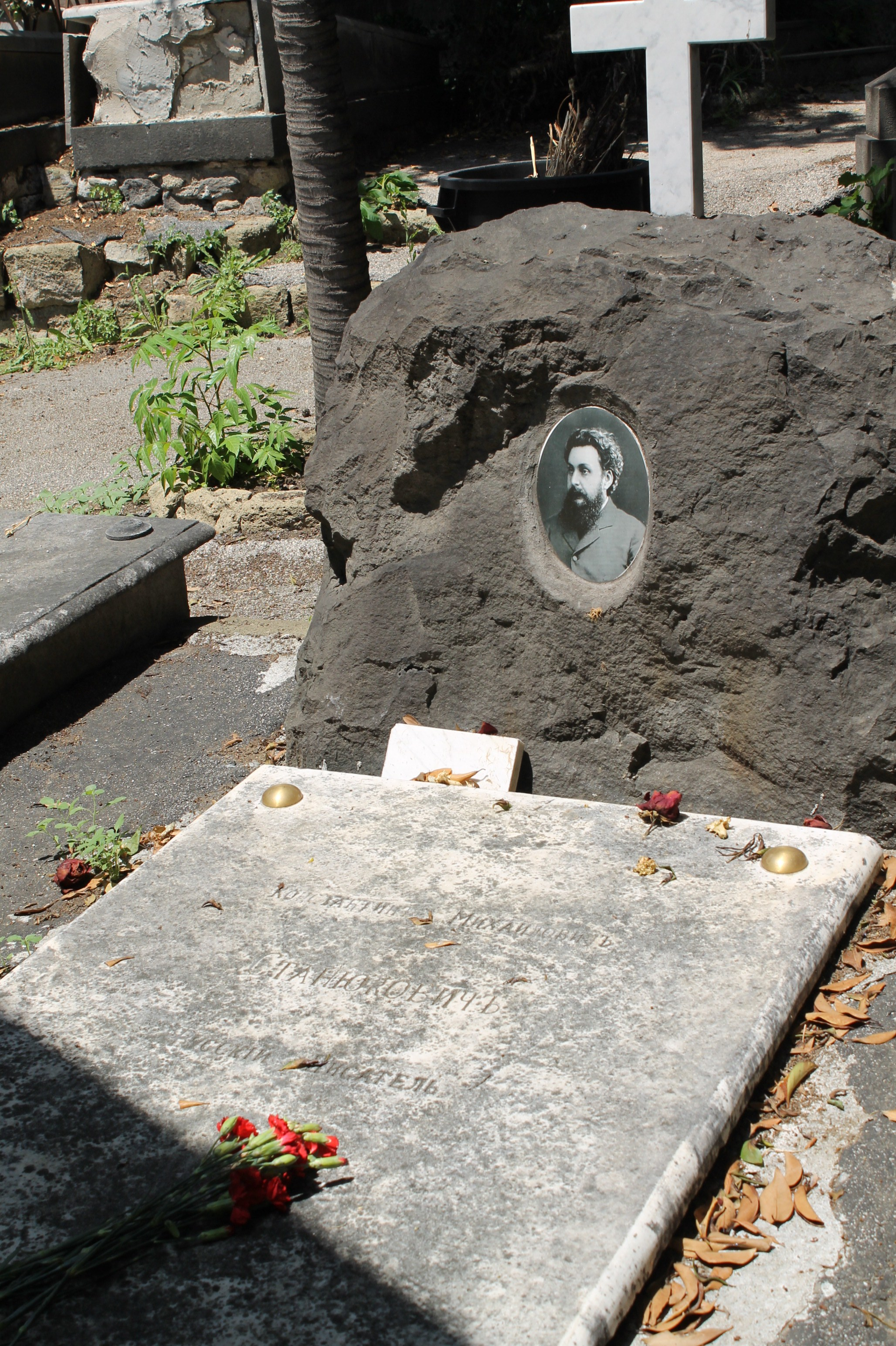 Захоронение на муниципальном кладбище Поджиореале, Русская зона. Неаполь